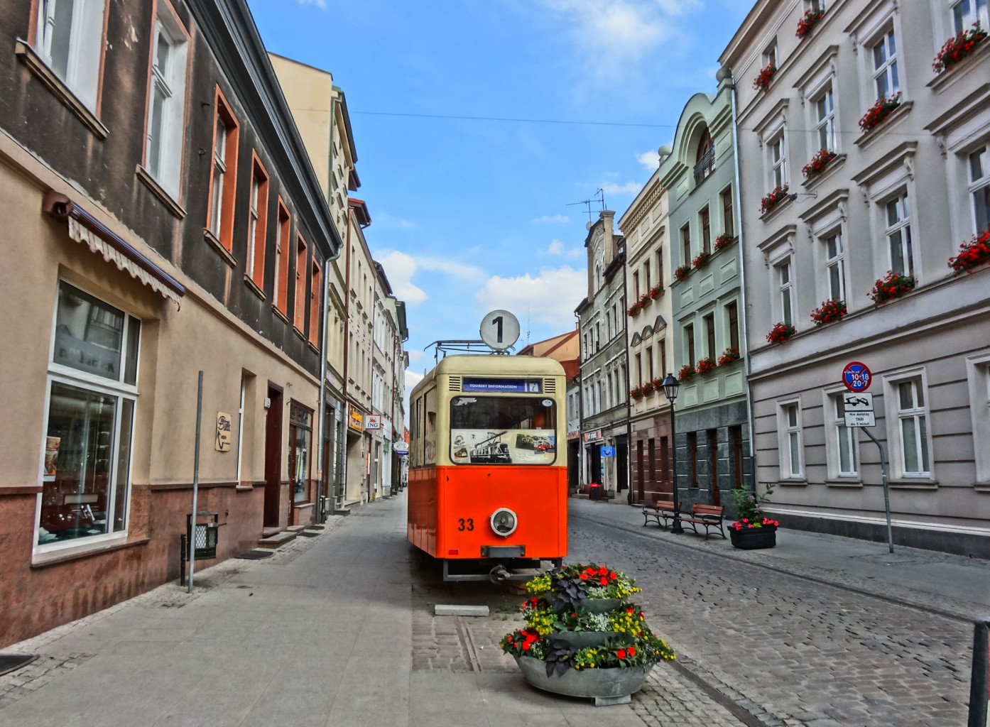 Ulica Długa na Starym Mieście w Bydgoszczy.Zabytkowy tramwaj, w którym mieści się Biuro Informacji Turystycznej.